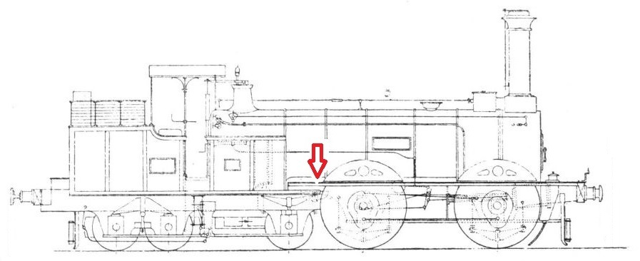 B3'-Schnellzugslokomotive System Engerth, 12 Stück gebaut 1857/58 von John Cockerill in Seraing für die k.k. nördliche Staatsbahn